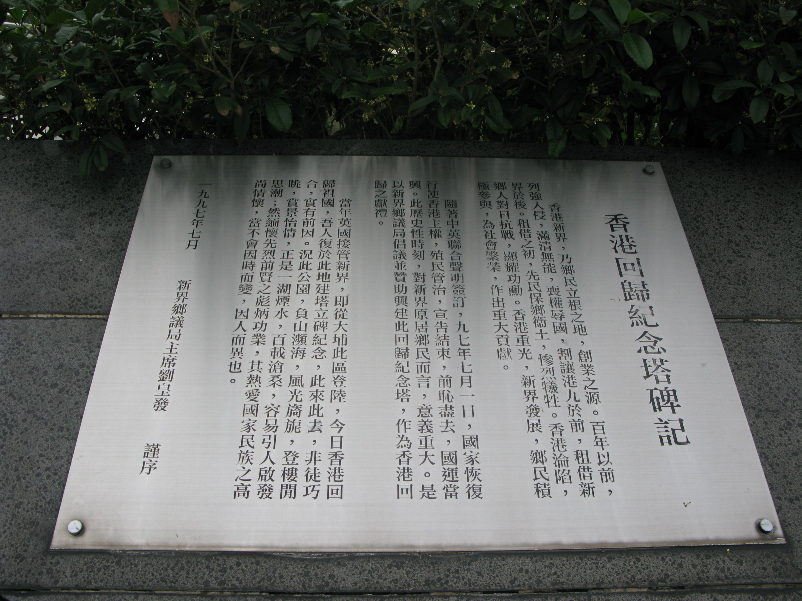 中文（香港）: 香港大埔區香港回歸紀念塔碑記